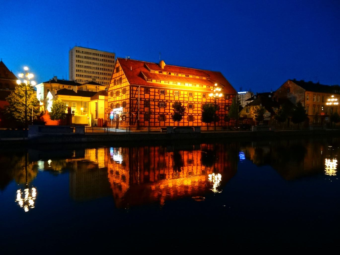 Spichlerz nad Brdą w Bydgoszczy przy ul. Stary Port zbud. w latach 30. XIX wieku